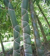 Phyllostachys pubescens var. Heterocicla 'Kikko' , Titus zur Megede , Japan